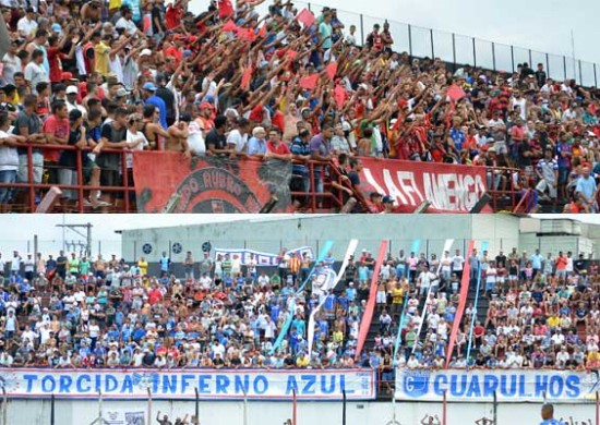 Torcedores do Guarulhos e Flamengo no Tranquilão